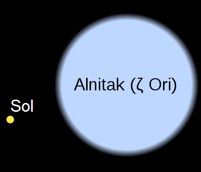 Tamaños comparativos de Alnitak y el Sol.